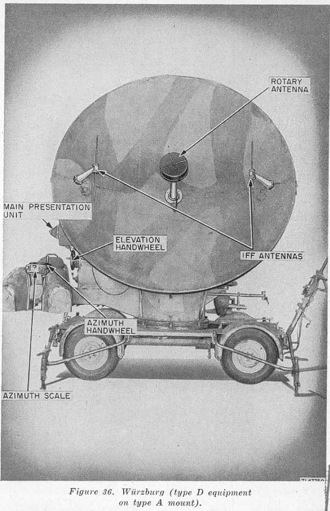 FuMG39 Würzburg IFF Antennen "Kuh" und "Gemse" im Spiegel